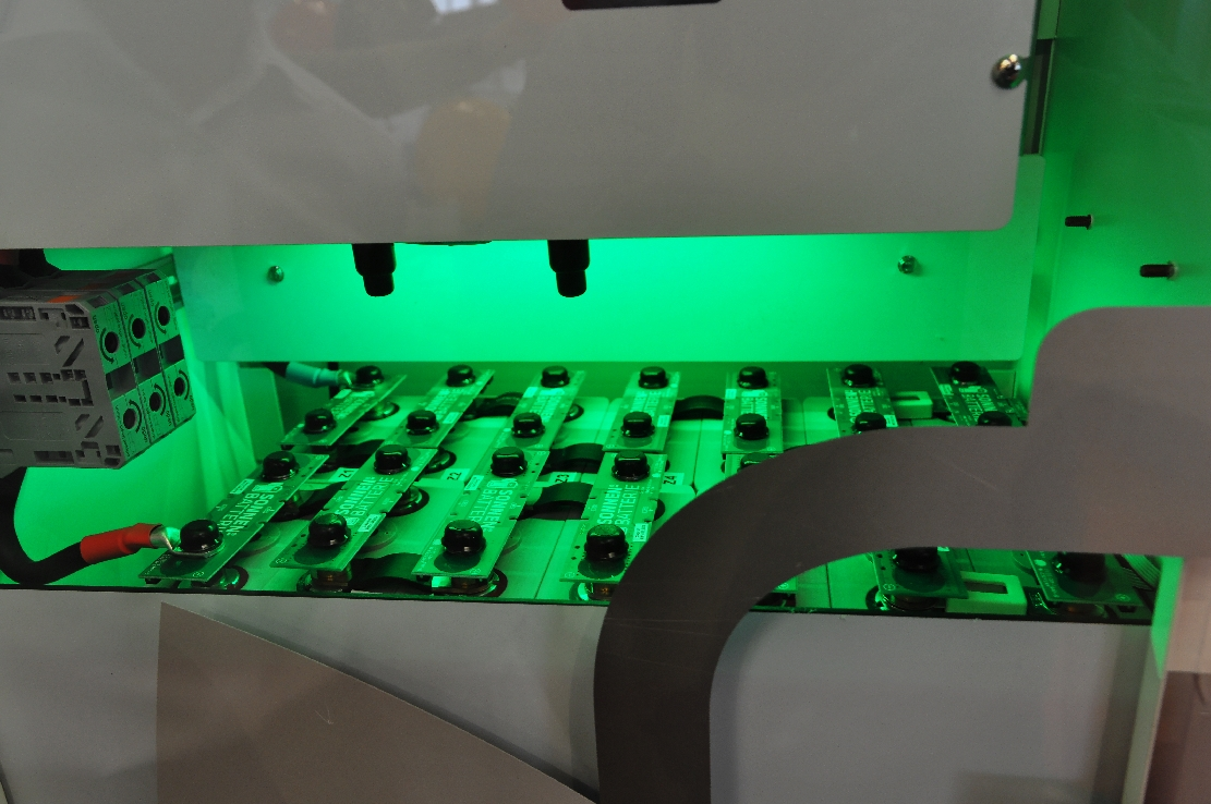 Haus & Energie 2015 in Sindelfingen.